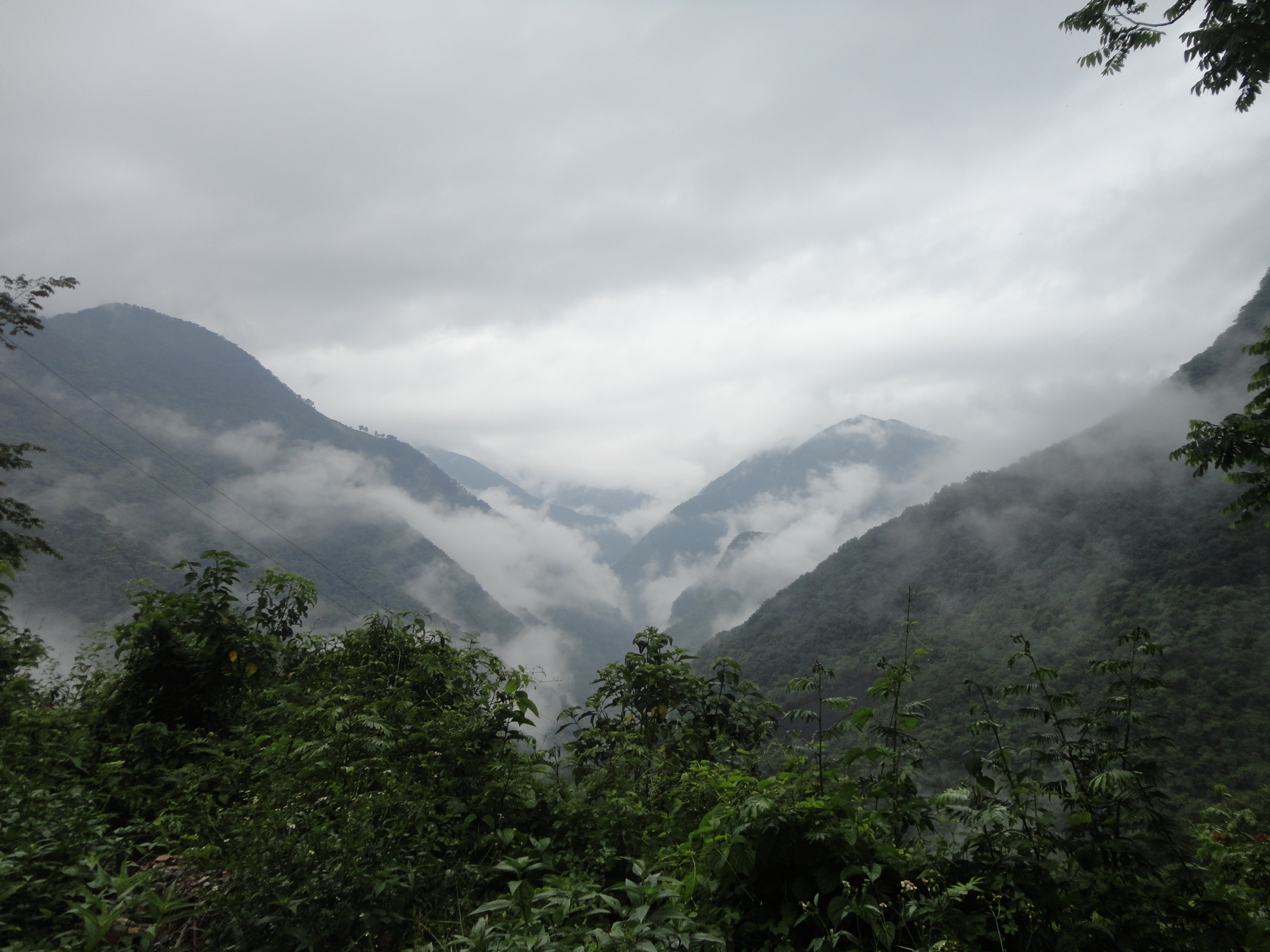 Sierra madre oriental, en el estado de Hidalgo, en el municipio de Molango, México